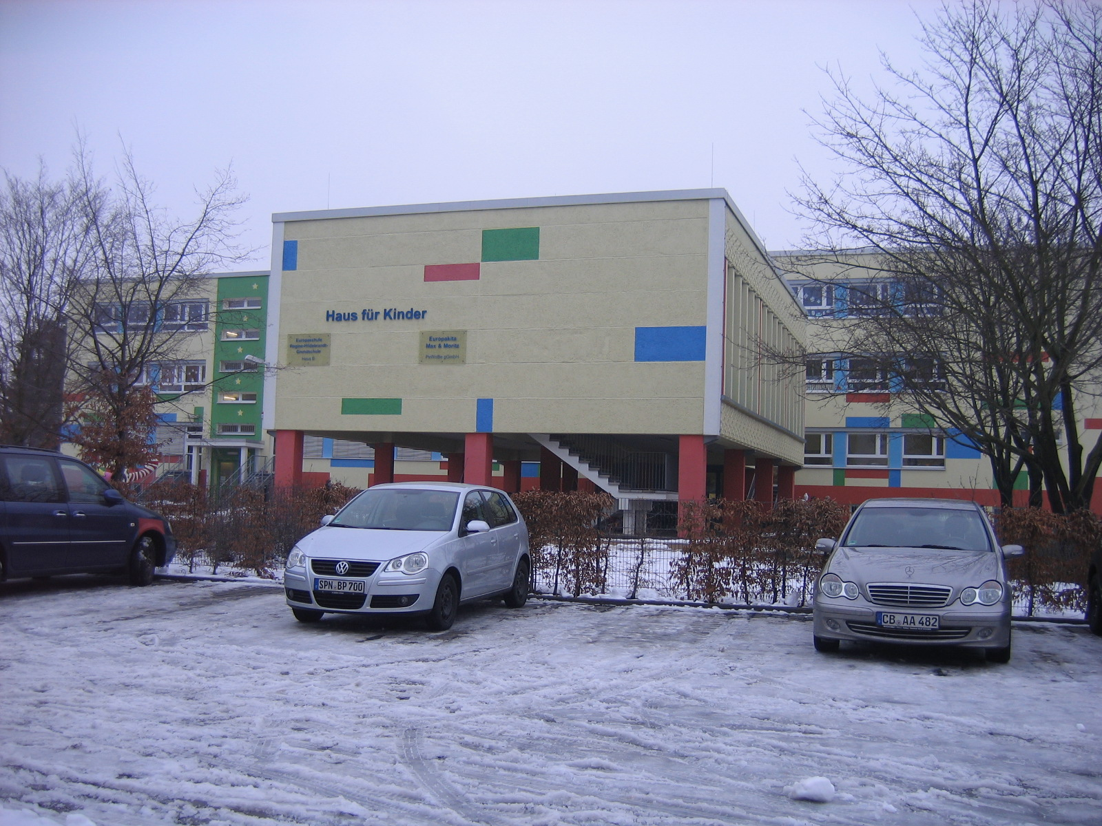 Regine-Hildebrand-Grundschule Haus B